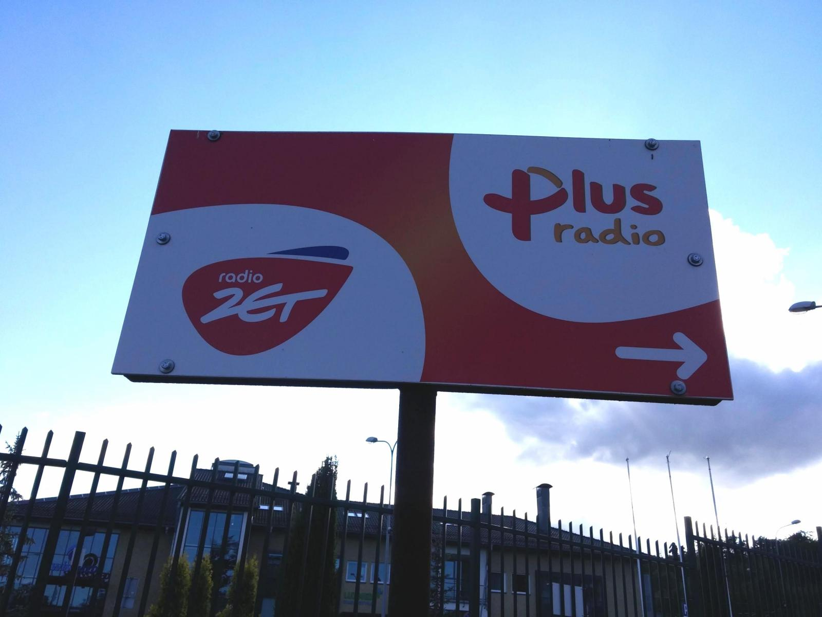 Kierunkowskaz do oddziału holdingu Eurozet. W skład jego grupy kapitałowej wchodzą m.in. Radio zet i Radio Plus. W tle - Szpital Swissmed.